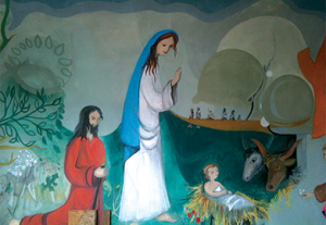 Nativité